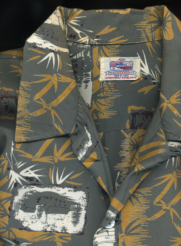 アロハシャツ デューク・カハナモク 1950時代